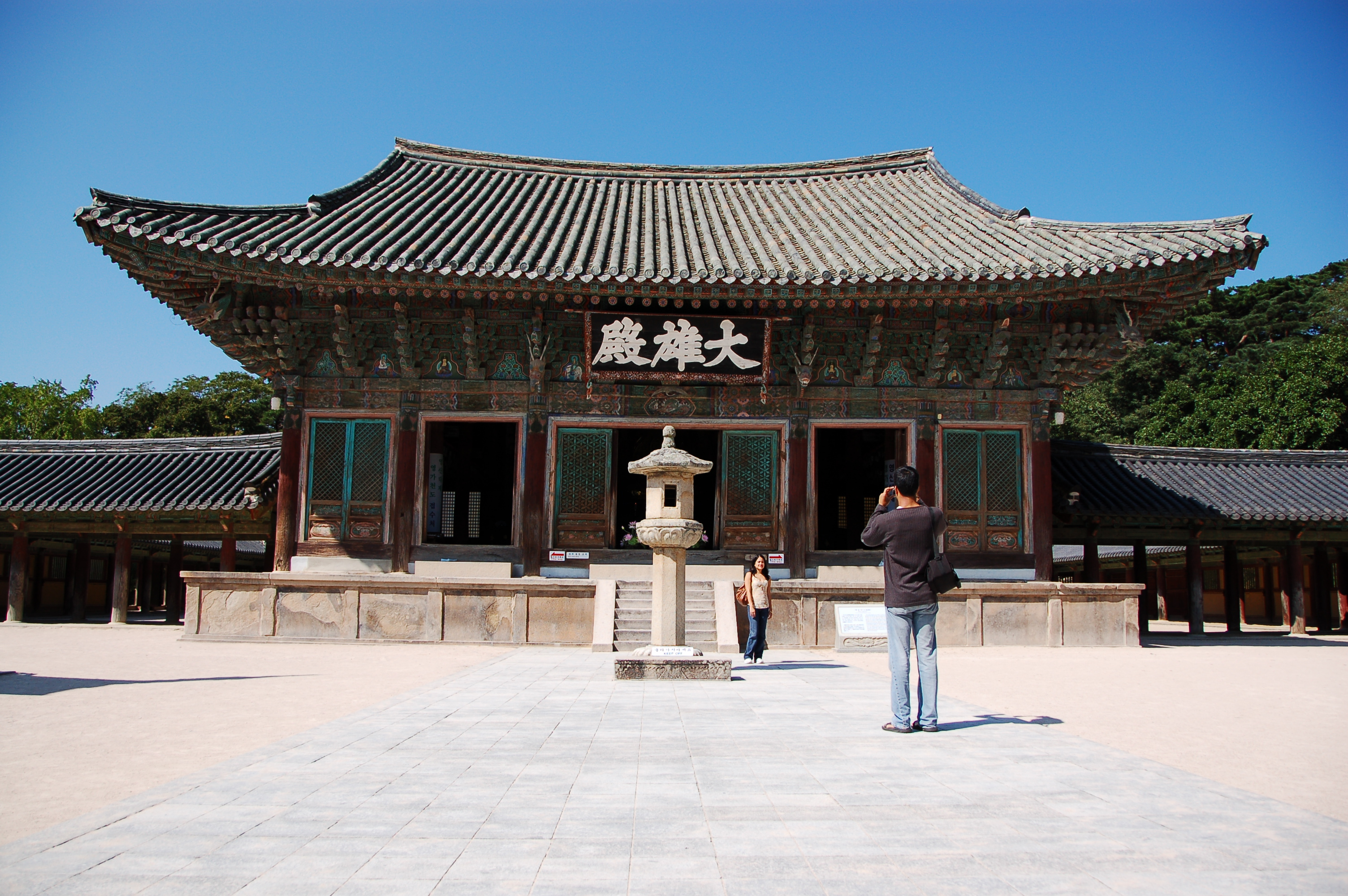 Daeungjeon at Bulguksa, Gyeongju, Korea